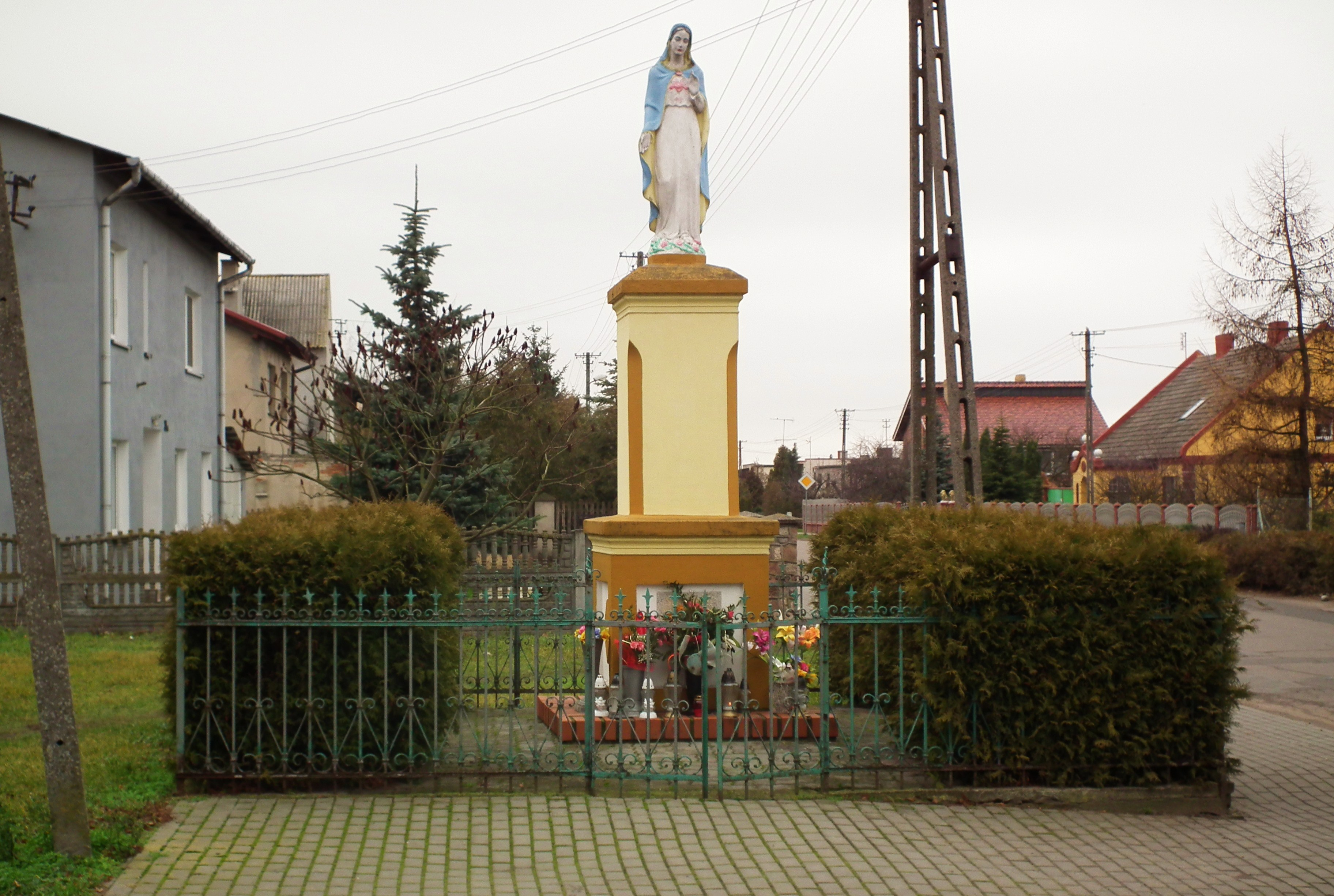 Centrum Mieleszyna.